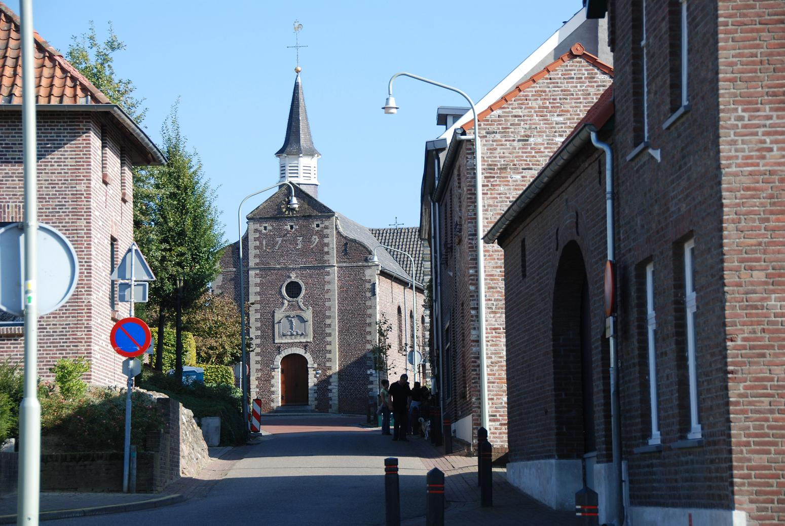 Limburgs: Sjweikese